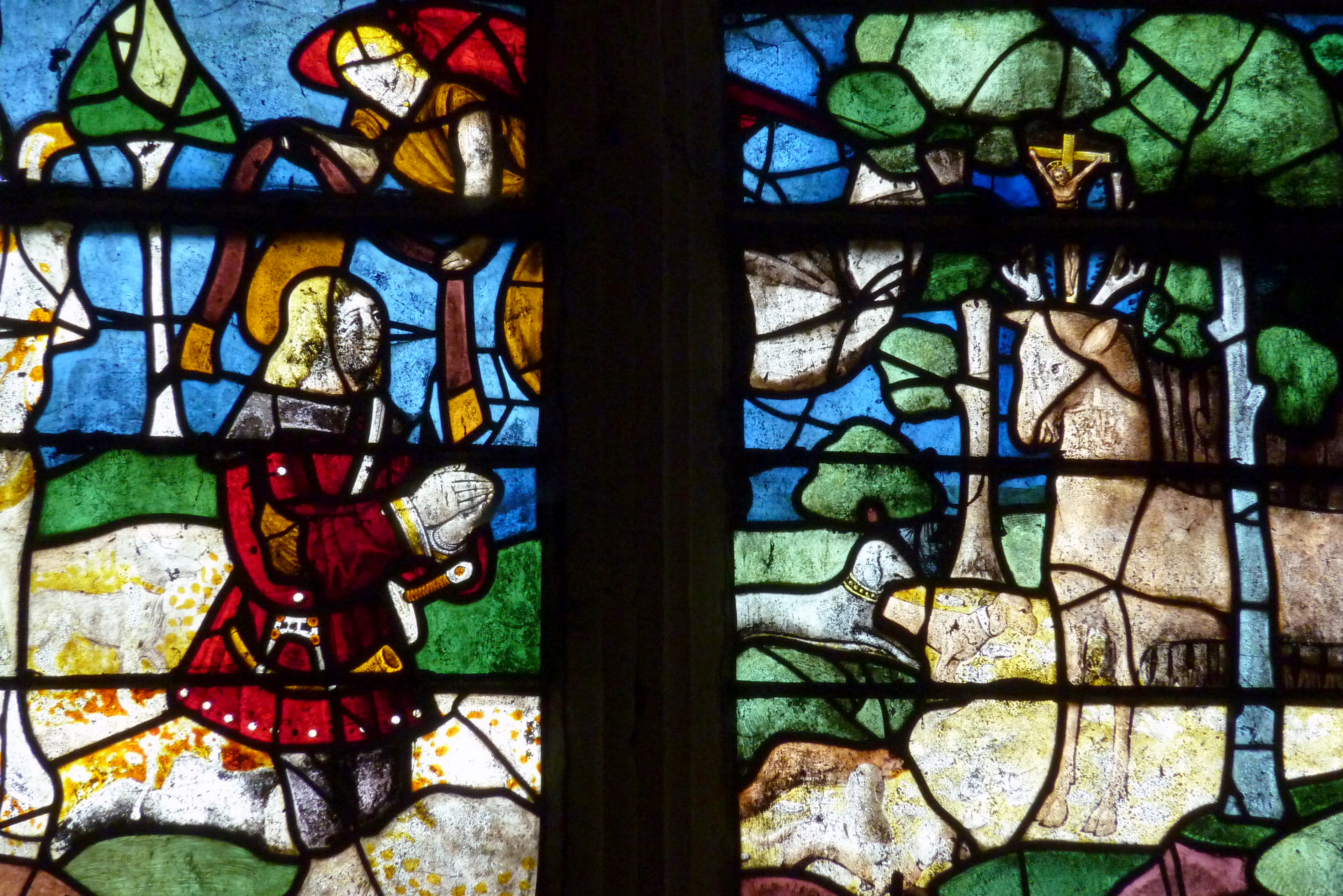 Katholische Kirche Saint-Remi in Ceffonds im Département Haute-Marne (Champagne-Ardenne/Frankreich), Bleiglasfenster (baie 7), von 1513; Darstellung: Hl. Hubertus und hl. Sebastian; unten Stifter und Stifterinnen; Ausschnitt: Hubertus und Hirsch mit Kreuz im Geweih .